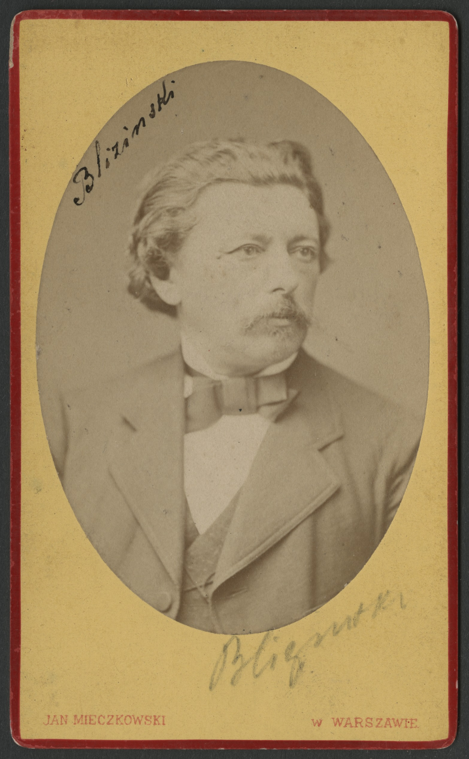 Portret Józefa Blizińskiego